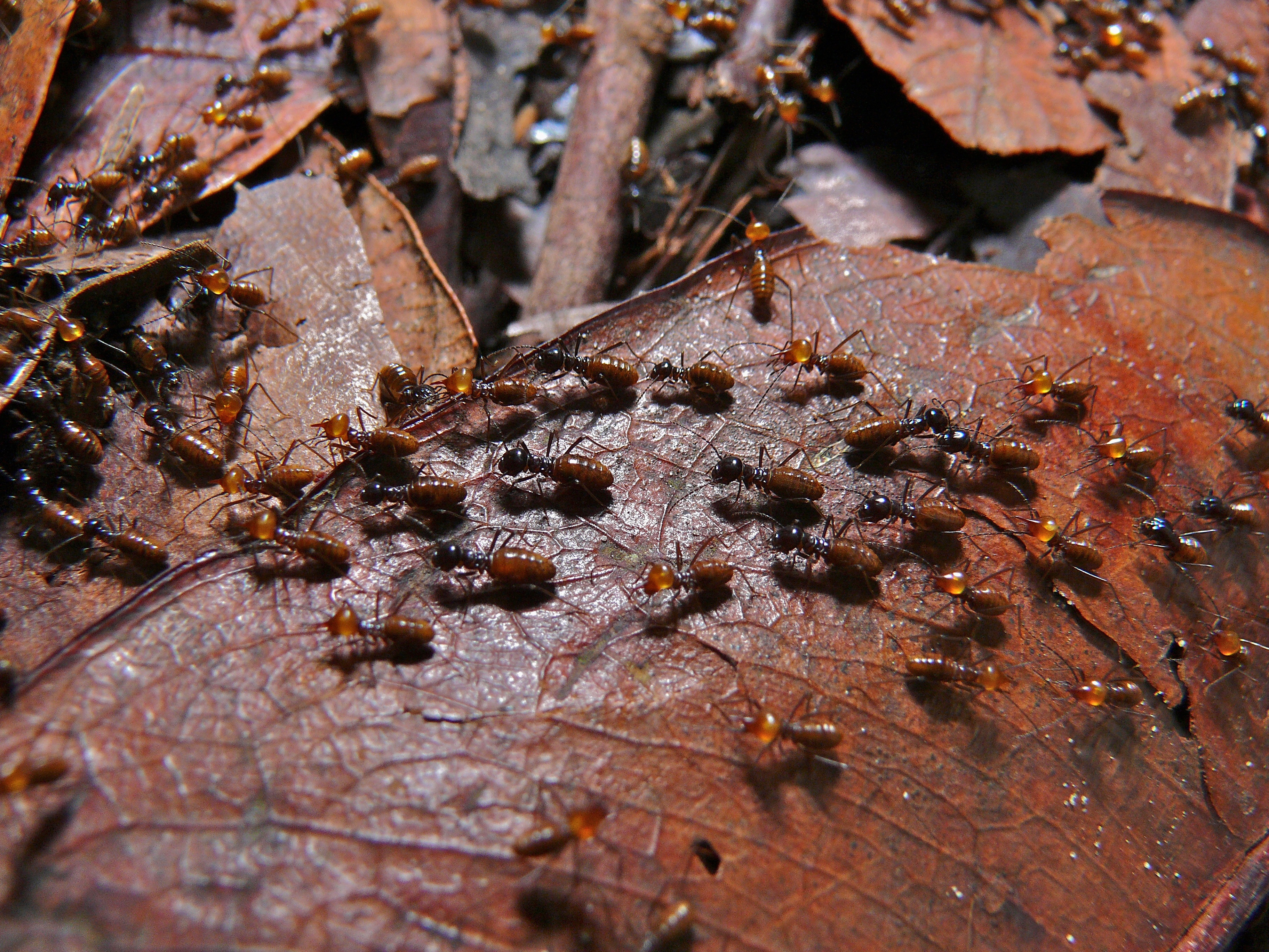 Lambir Hills NP, Sarawak, MALAYSIA